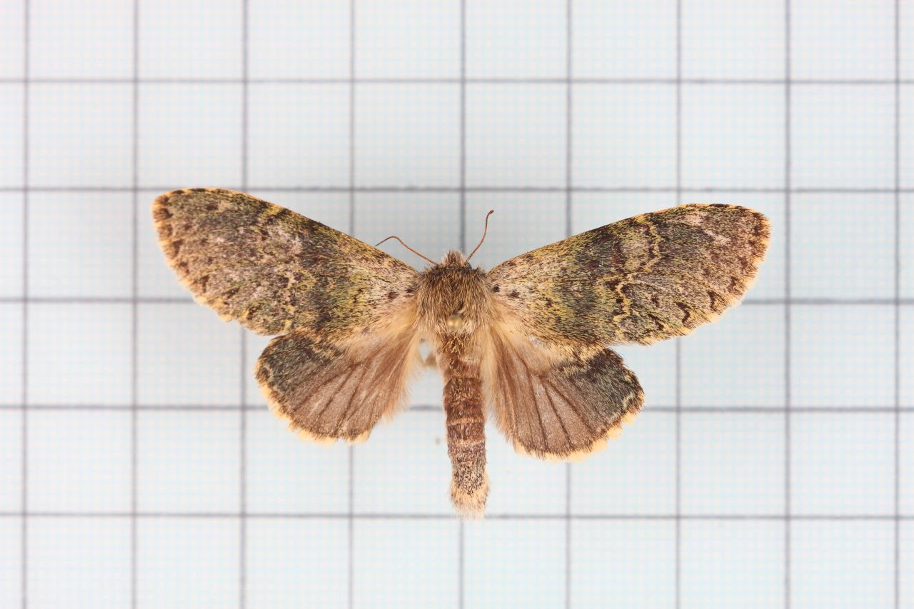 Stauropus sikkimensis lushanus Okano, 1960 錫金蟻舟蛾 認識台灣的昆蟲 P.100 鞍2:P.100,Pl.50-1 male